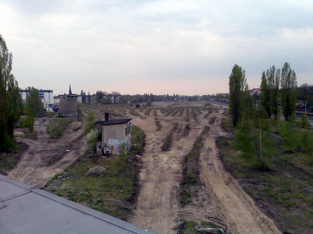 Berlin-Pankow, alter Güterbahnhof zwischen den Ortsteilen Pankow und Heinersdorf